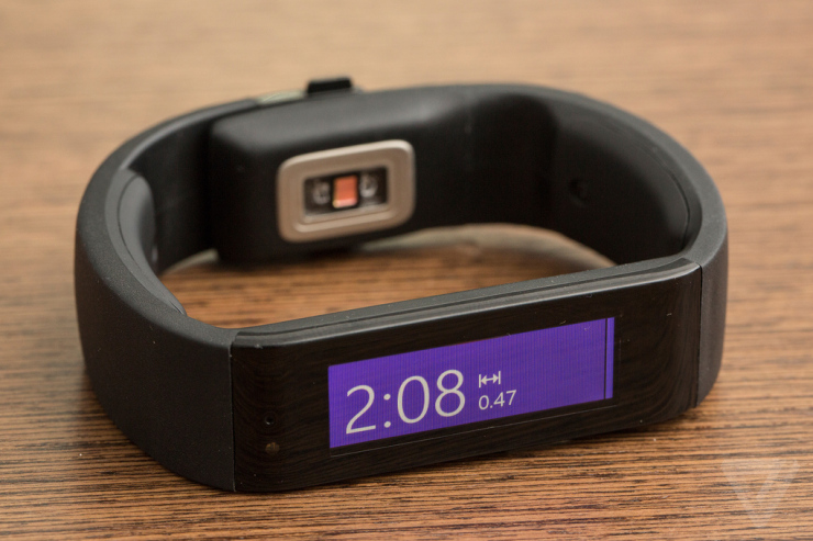 Este es el Microsoft Band